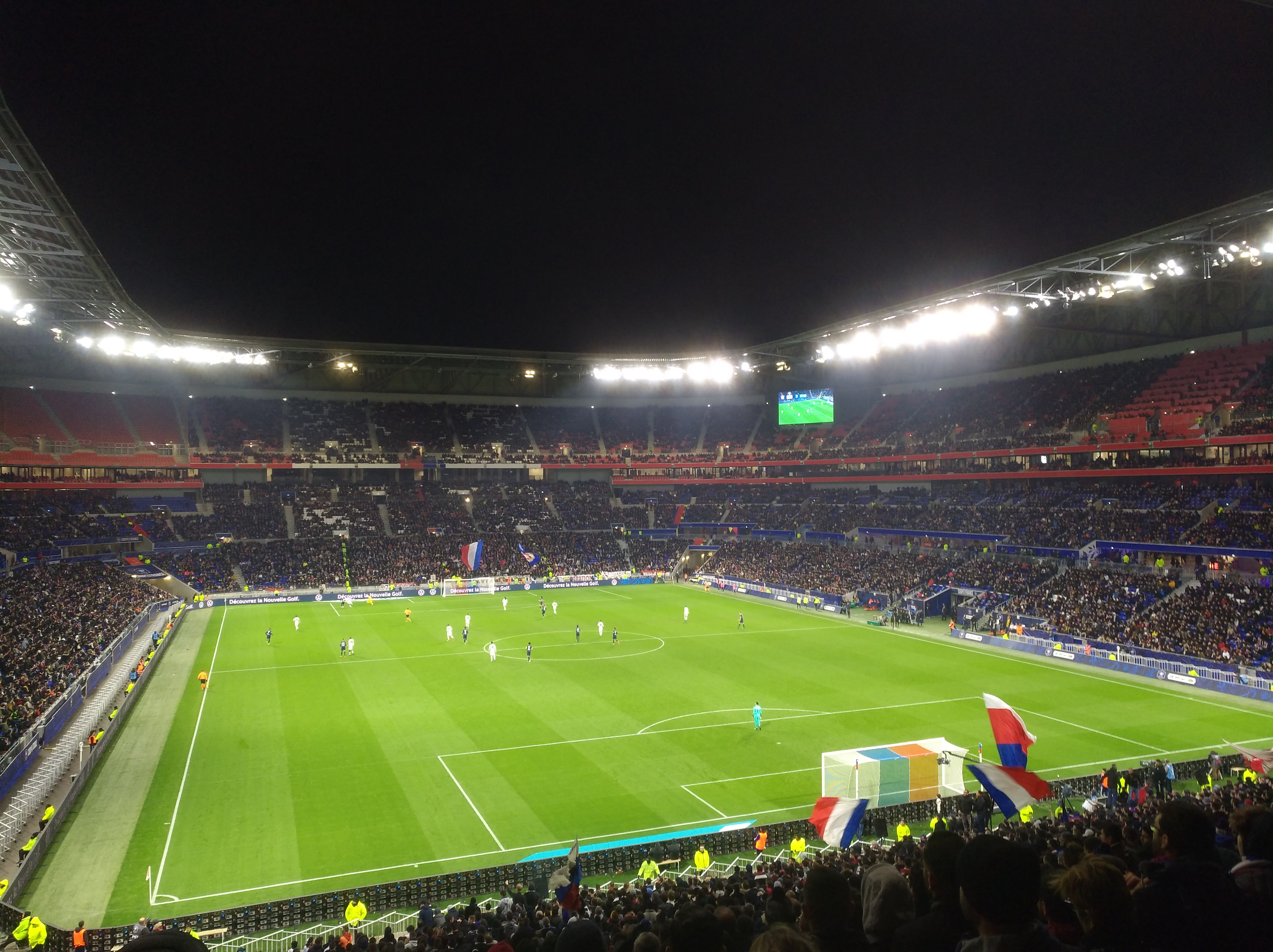 Vue du Groupama Stadium lors de la demi-finale de la Coupe de France de football 2019-2020, lors du match Olympique lyonnais - Paris Saint-Germain (1-5).